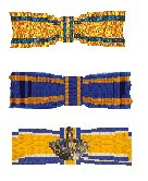 Eigen tekening , speciaal voor een bepaald artikel gemaakt. Robert Prummel